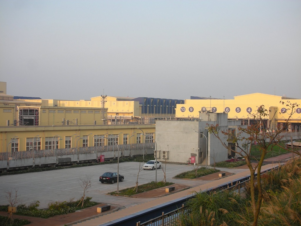 楊梅市新富車站所見臺鐵富岡車輛基地